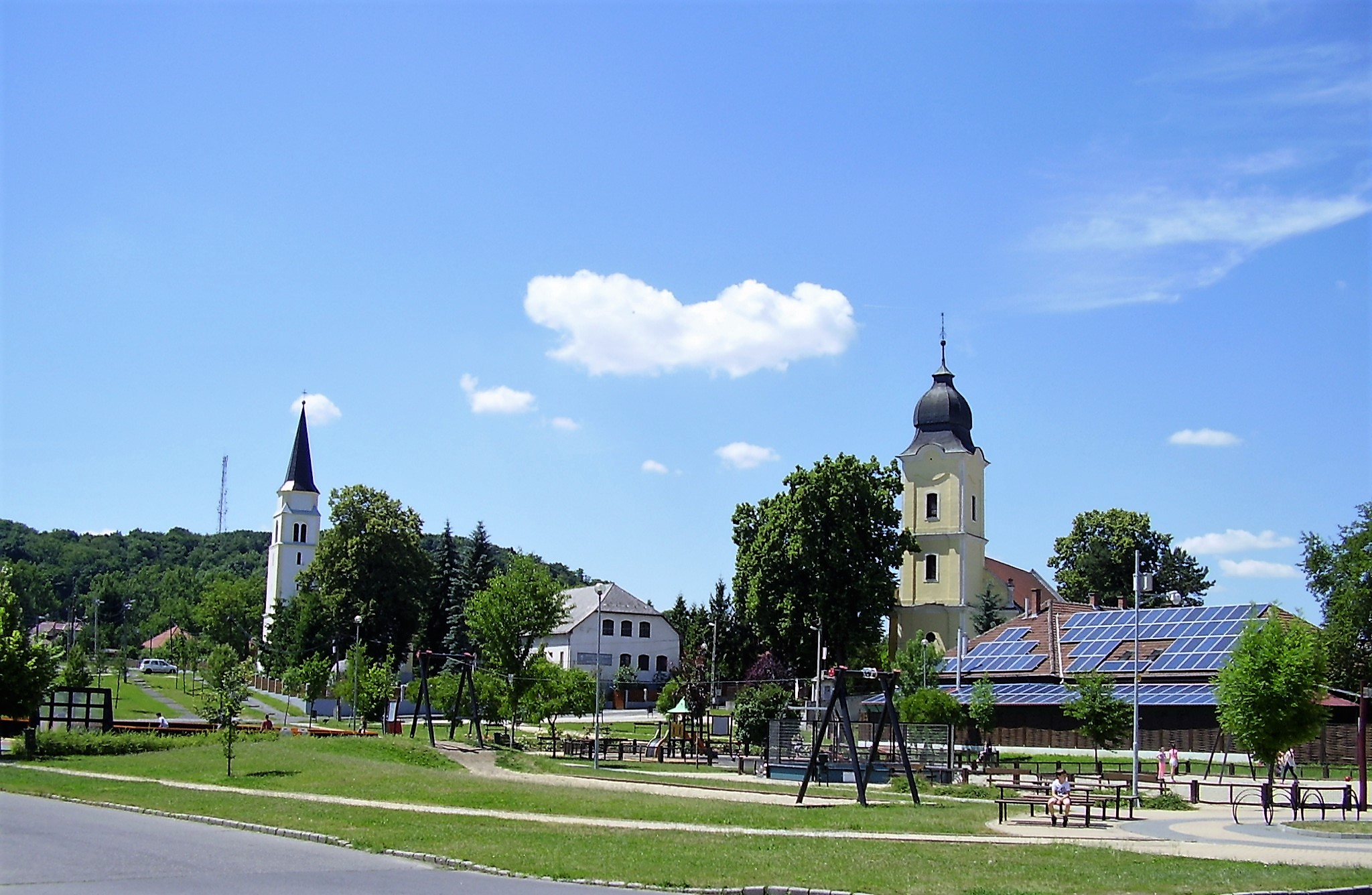 Jobbra: a sajókazinci református templom. Balra: az 1913. júniusában felszentelt Ávilai Nagy Szent Teréz-templom.